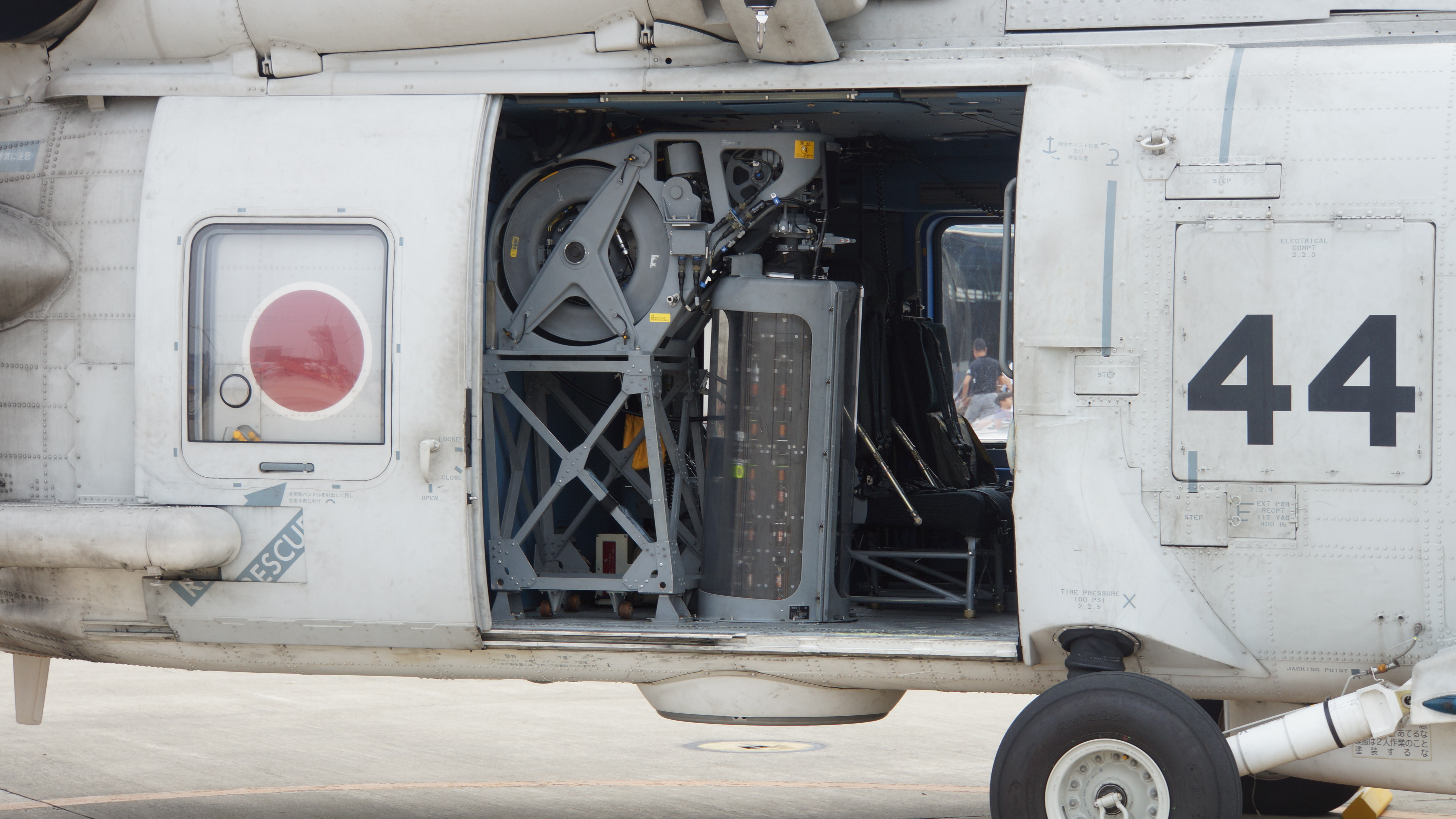 海上自衛隊 SH-60K哨戒ヘリコプター（8444号機） キャビン内のHQS-104ディッピング・ソナー。2016年10月2日 陸上自衛隊明野駐屯地にて。